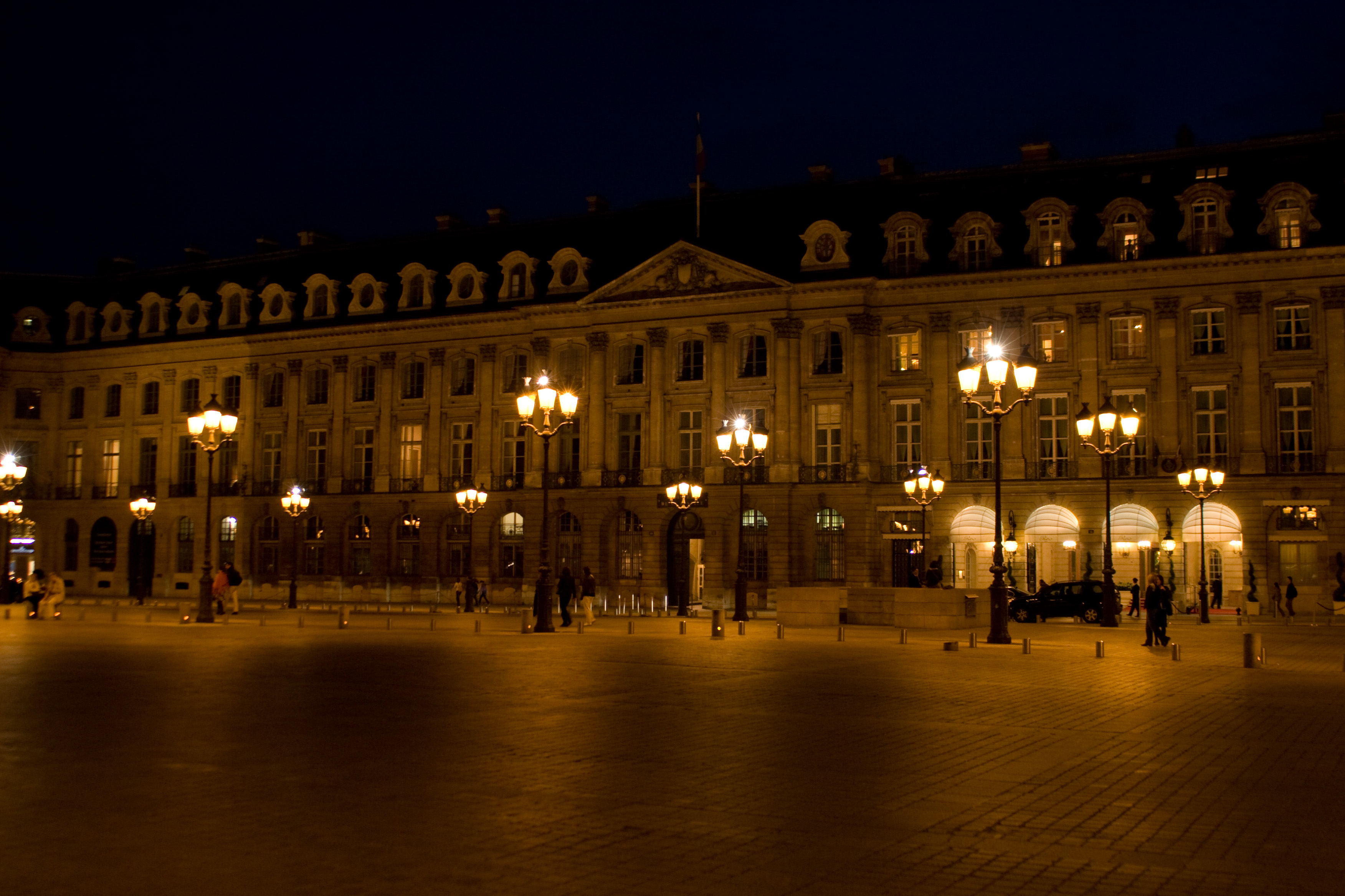 Hôtel de Bourvallais (ministère de la Justice) et Hôtel Ritz, place Vendôme, Paris